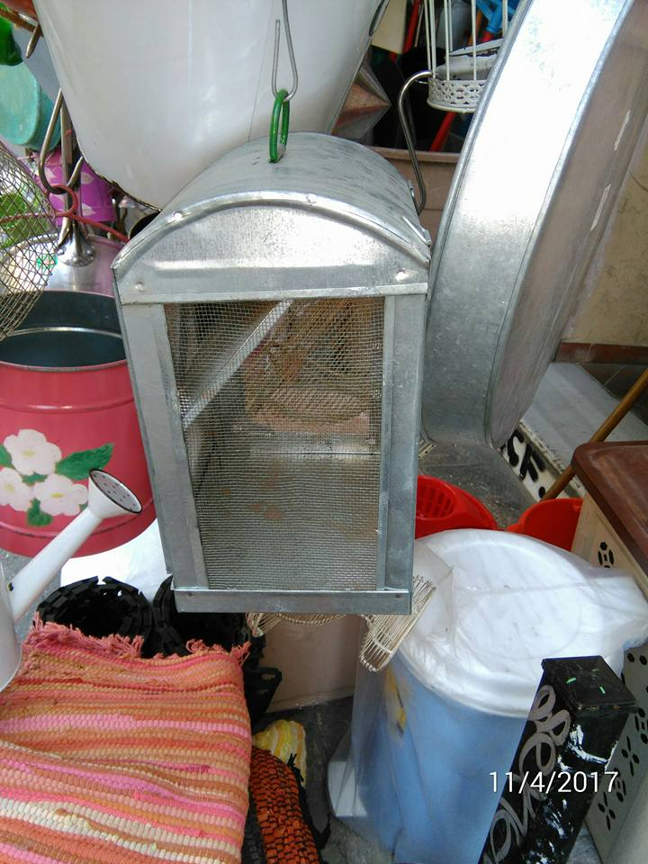 παλιό μέσο βραχύβιας συντήρησης τροφίμων